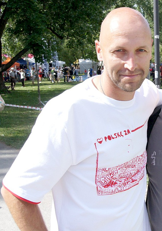 Paweł Januszewski, polish hurdler